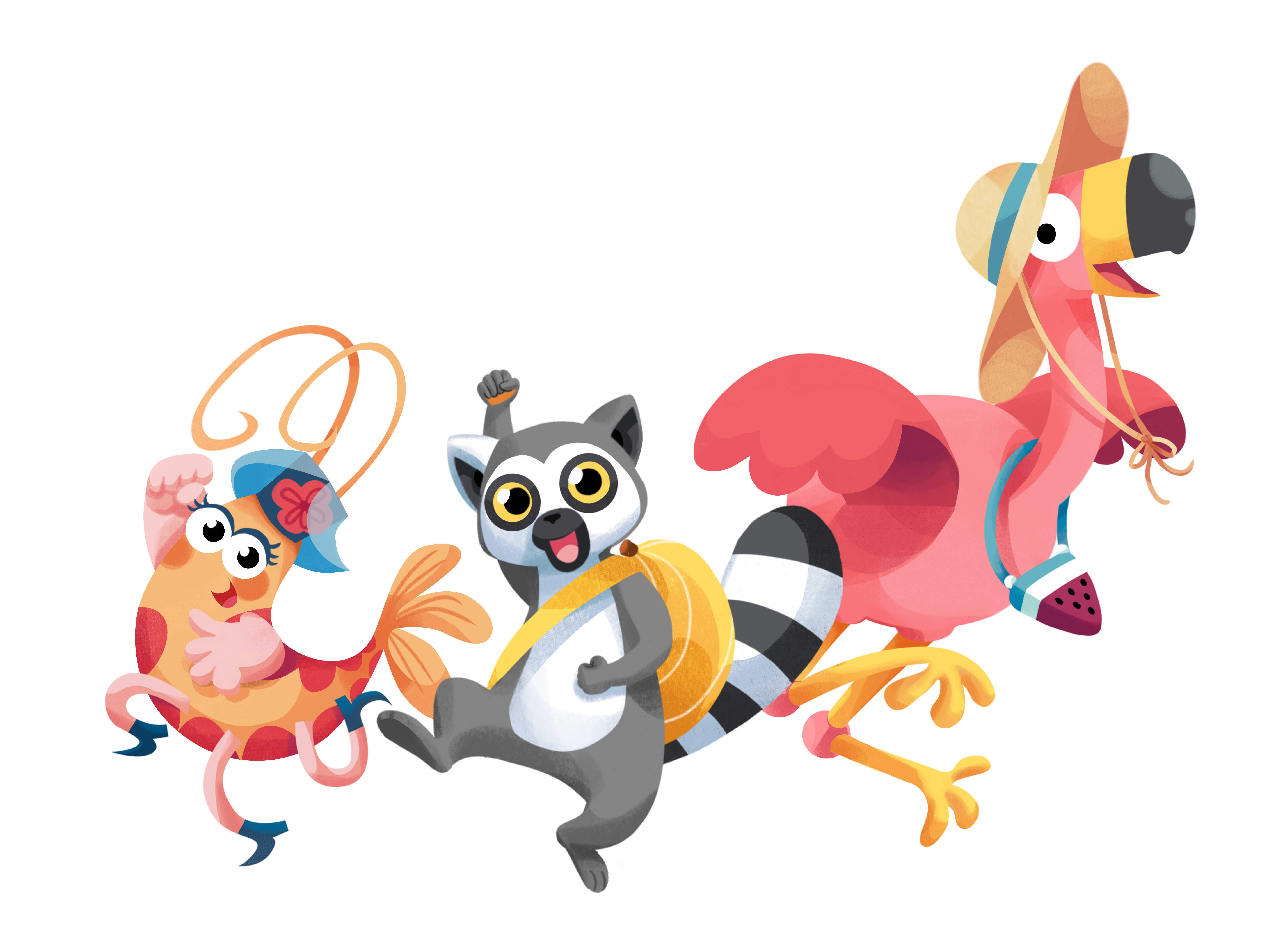 In der Kinderbuchreihe "Kattas Welt" erkunden der kleine Halbaffe Katta und seine Freunde Adele Garnele und Ingo Flamingo die Welt.